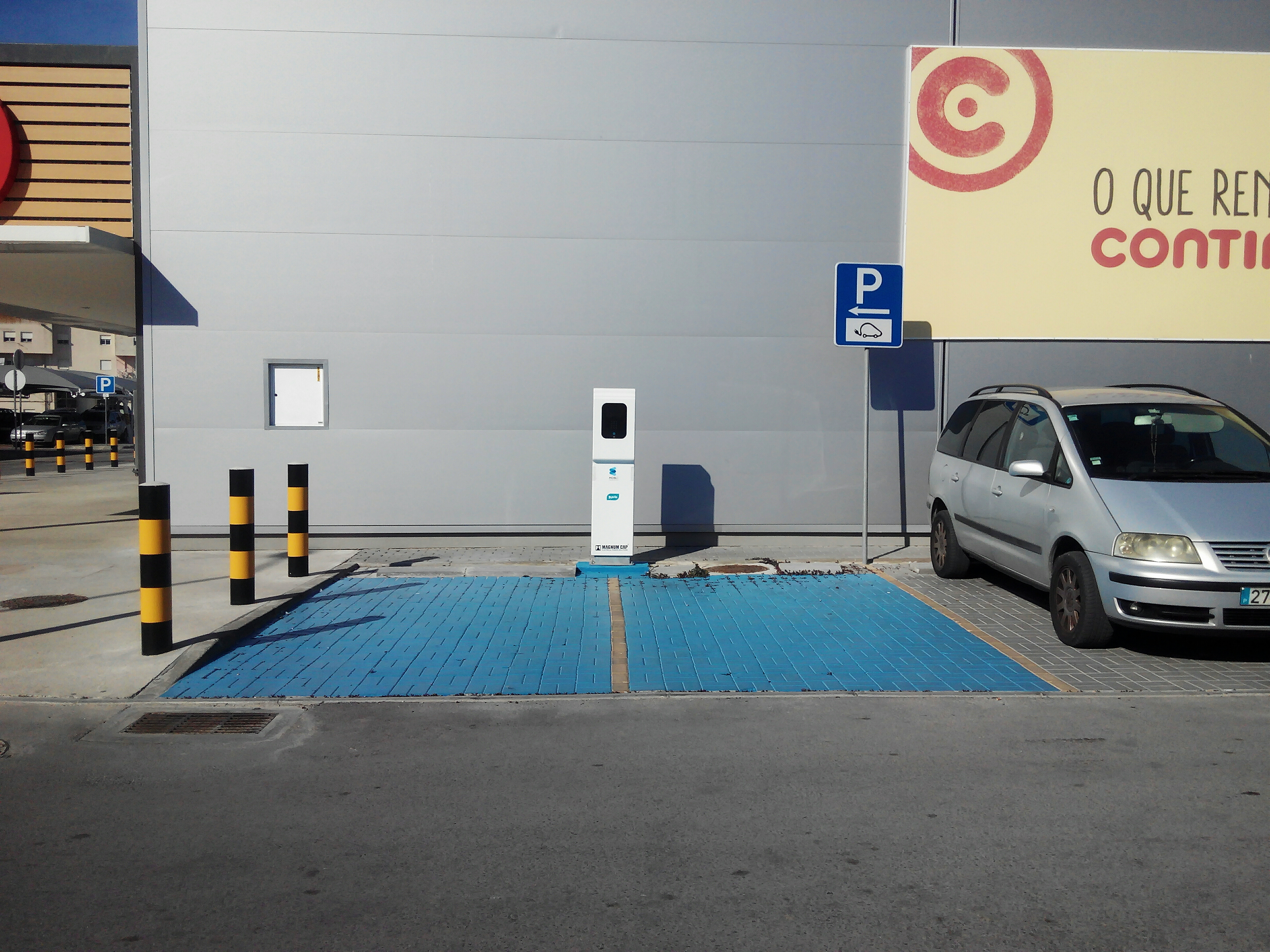 Posto de carregamento Mobi.E no Continente Bom Dia de Alcochete.